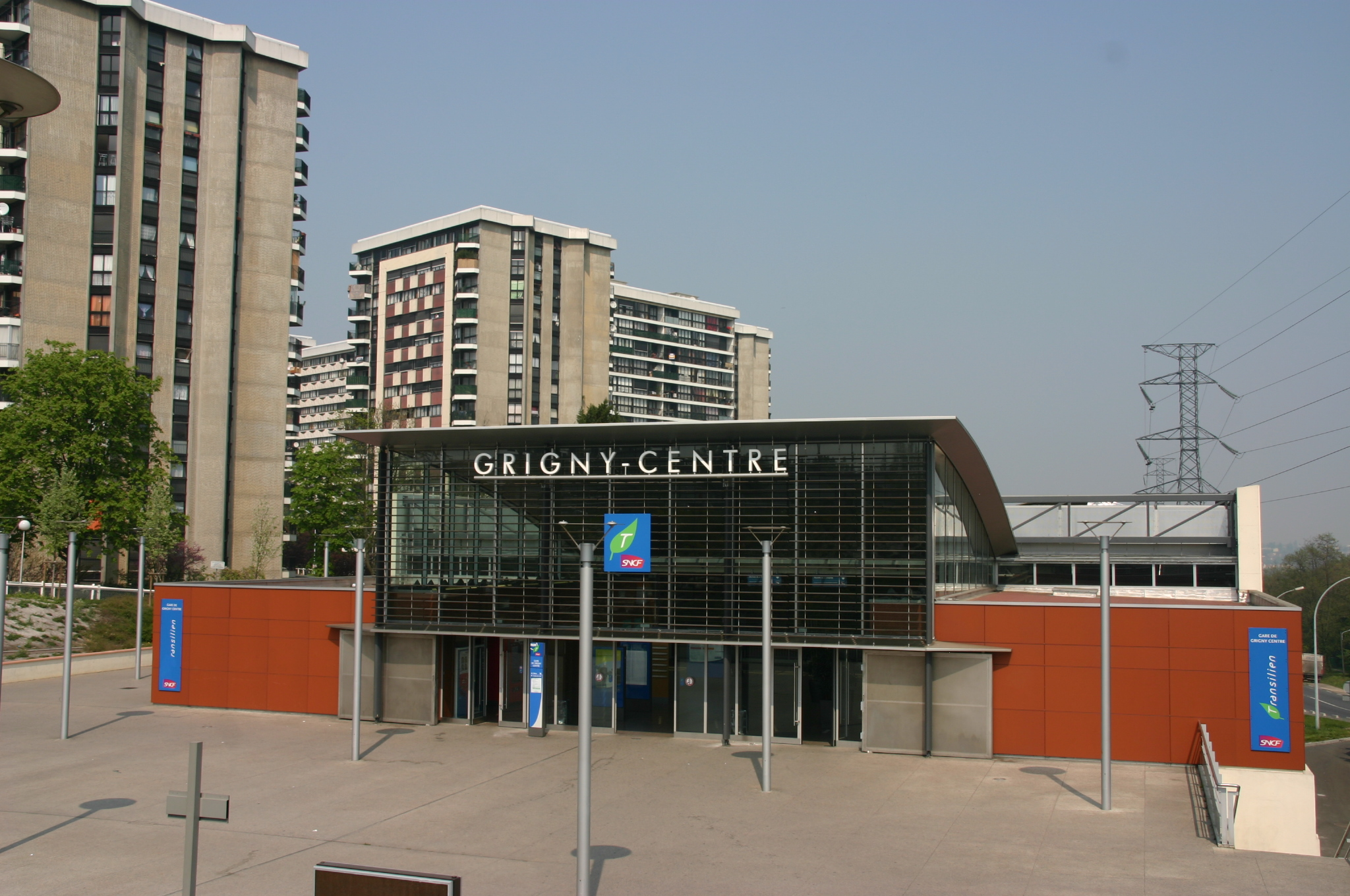 La Gare de Grigny-Centre , Grigny, département de l'Essonne, France